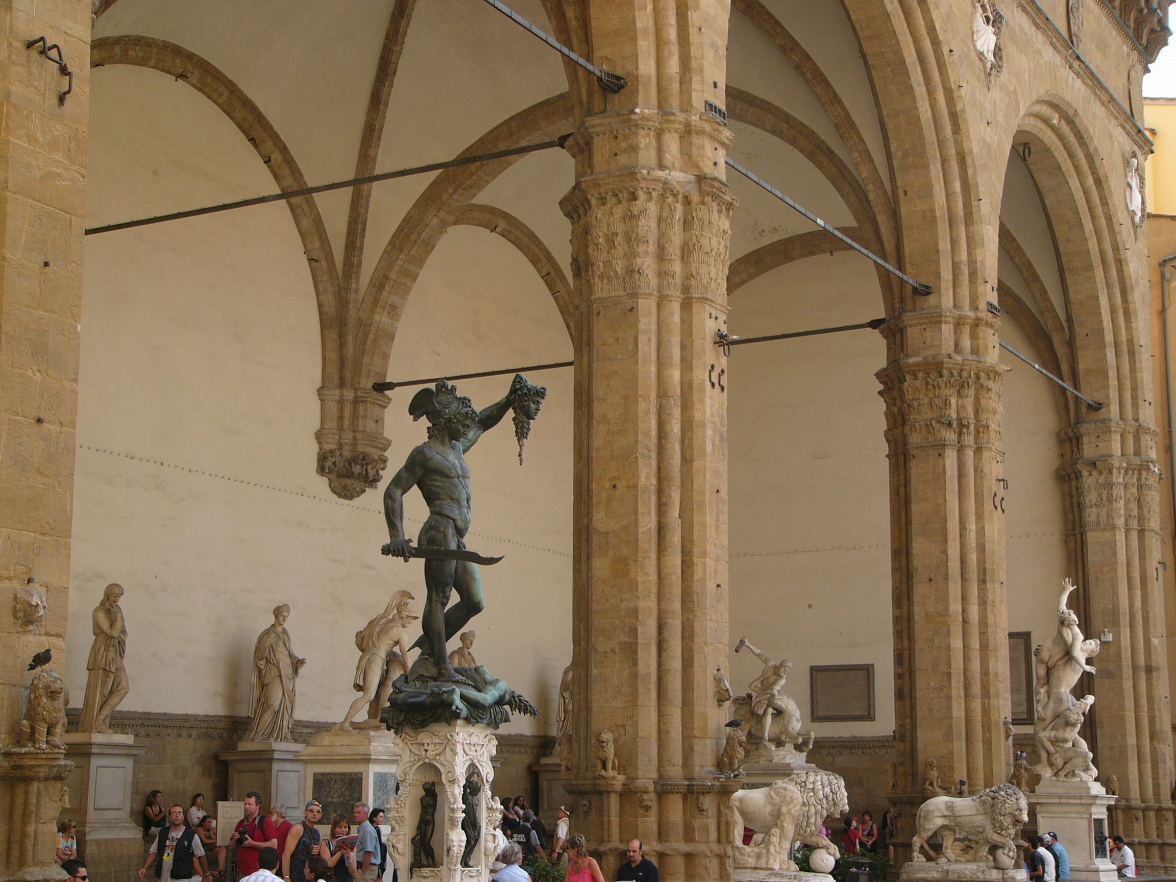 Loggia dei Lanzi in Florence